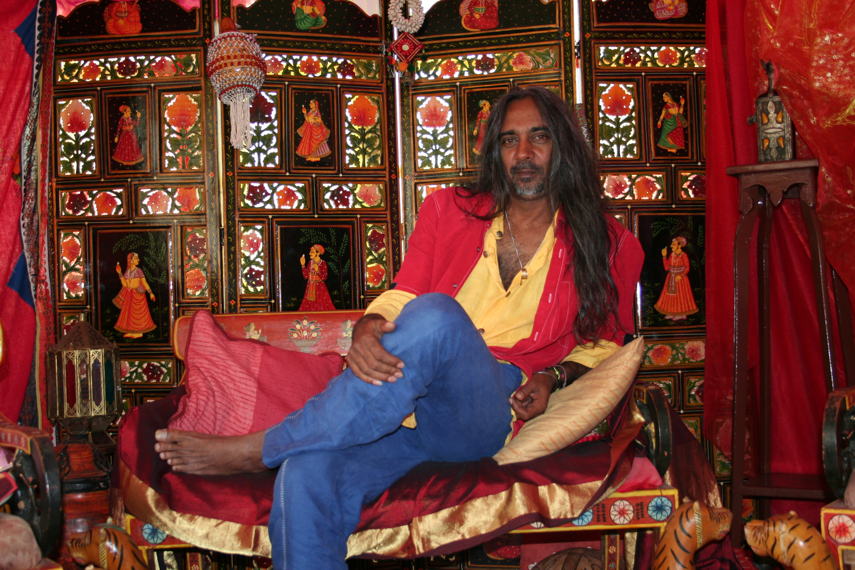 Gilbert Pounia chez lui.